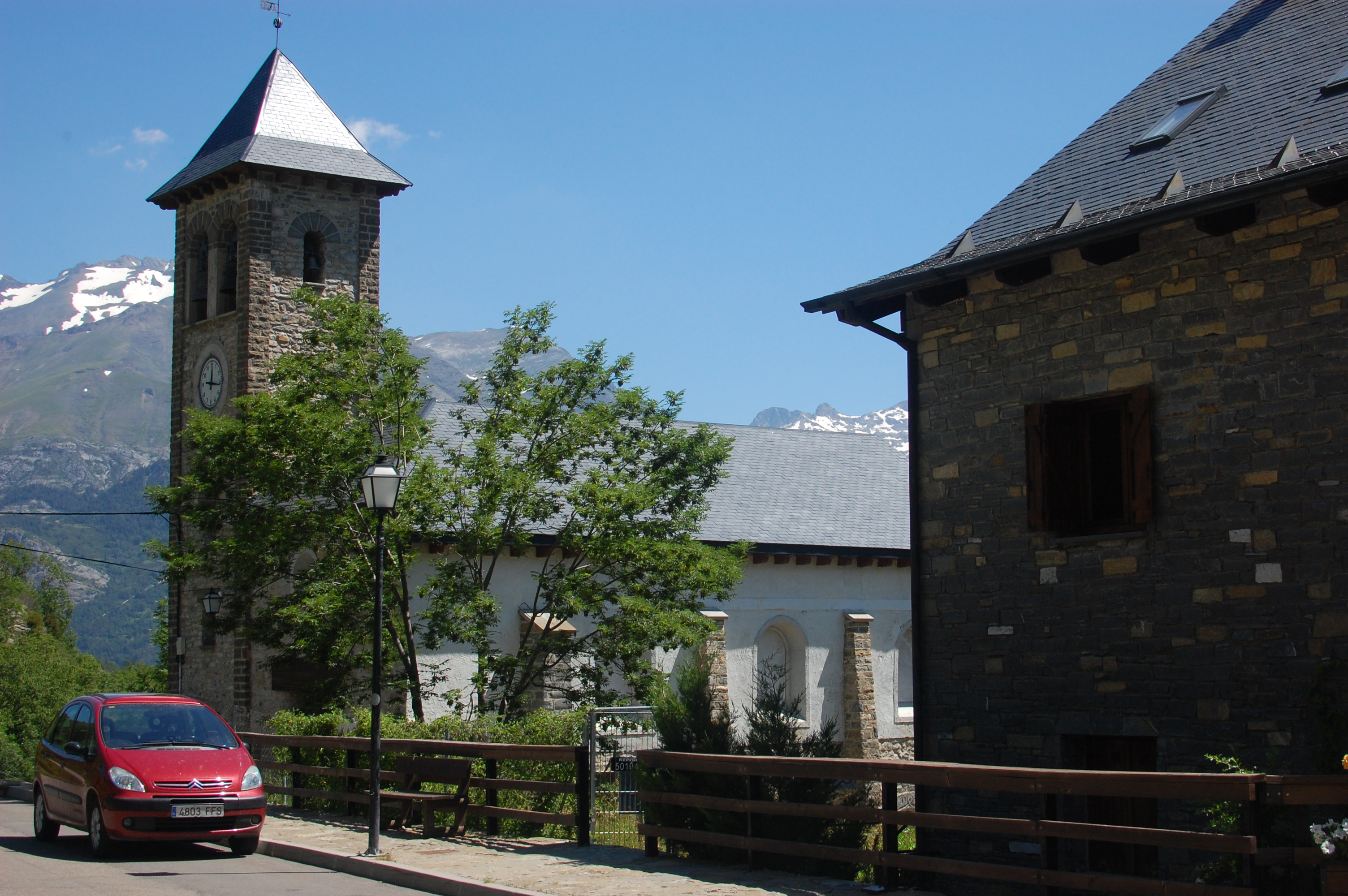 Aragonés: Ilesia de Piedrafita de Tena